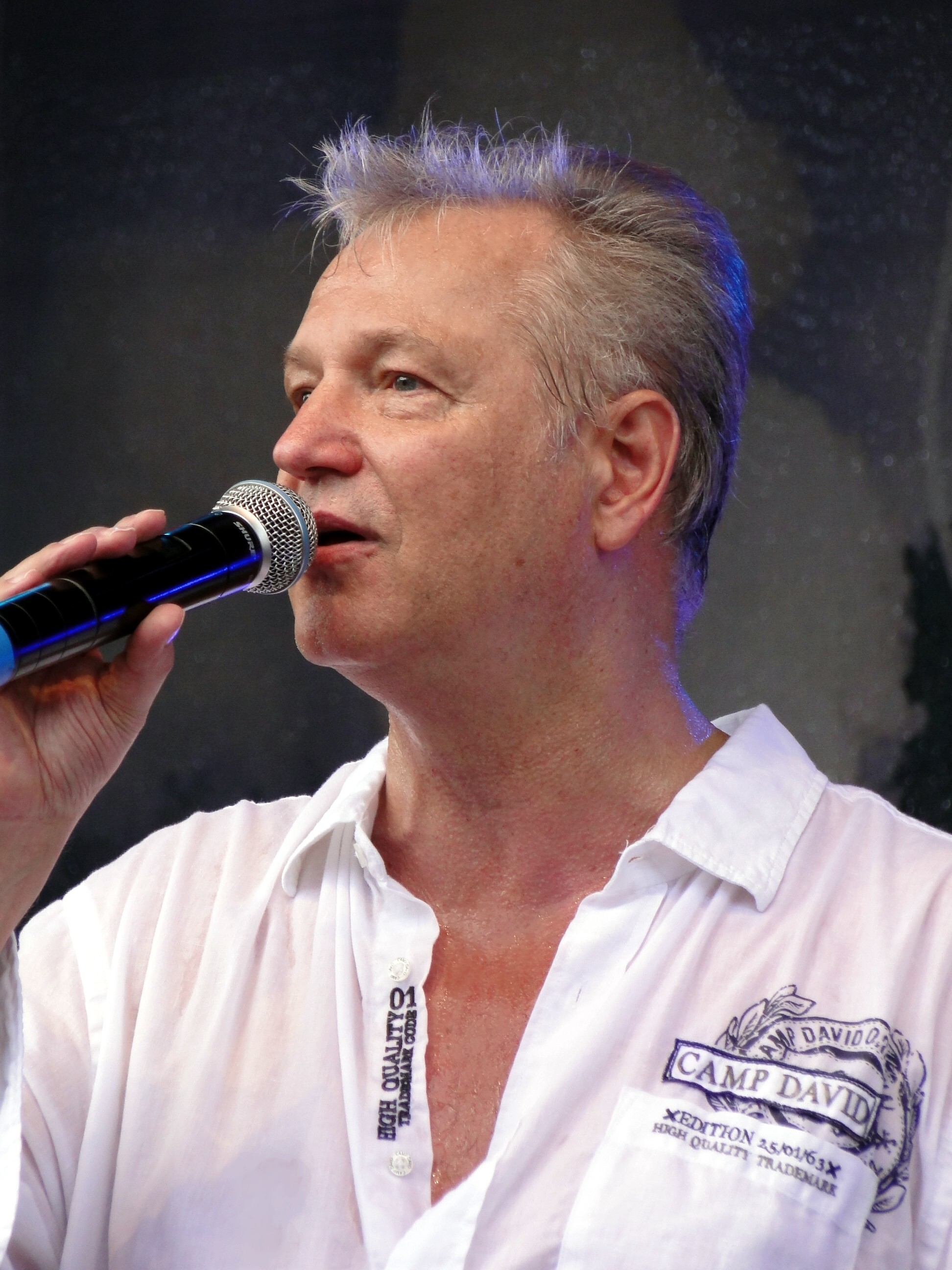 Der deutsche Schlagersänger Gerd Christian bei einem Auftritt im August 2010